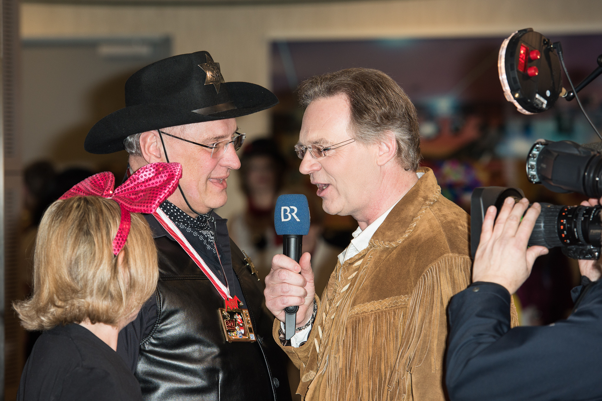 BR,Bayerisches Fernsehen,Charly Hilpert,Fastnacht in Franken,Fastnachts-Verband Franken,Joachim Herrmann,Karneval,Live-Sendung,Mainfrankensäle